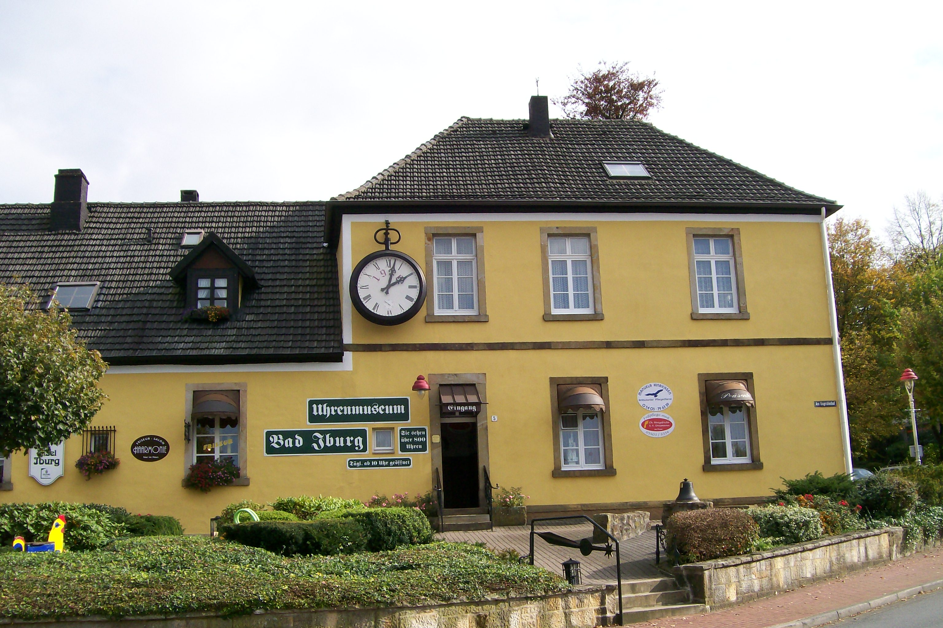 Uhrenmuseum Bad Iburg in Bad Iburg, Niedersachsen